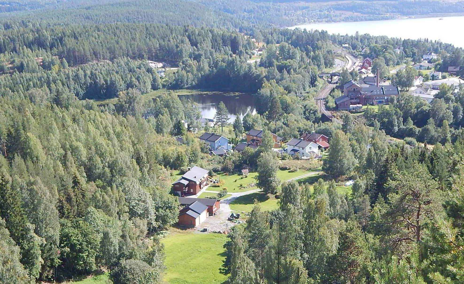 Tangen sett fra Gjellberget